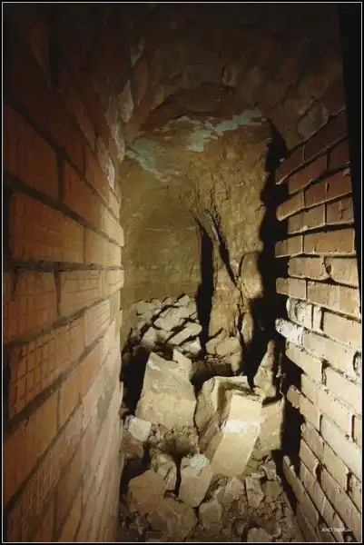 Пещеры Бузулукского Спасо-Преображенского монастыря. Предположительно одна из келий.